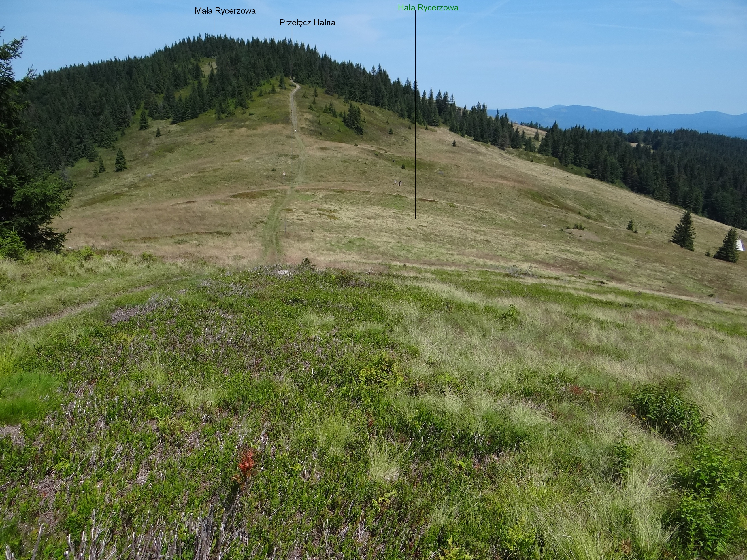 Widok na Małą Rycerzową i Halę Rycerzową